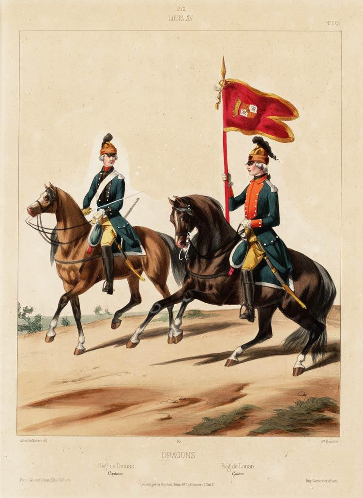 1772. Louis XV. Dragons: Rég.t de Damas, capitaine; Rég.t de Lanan, Guidontratto da: Costumes militaires français depuis 1439 jusqu'en 1789 / A. de Marbot. Gambart, Junin & Co